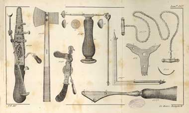 Una de las láminas que acompañan al Resumen de cirugía (1856), de Diego Argumosa (Instituto de Historia de la Medicina y de la Ciencia López Piñero —Universitat de València-CSIC). Leyenda: 1. Sierra de cresta de gallo para regiones prominentes 2. Sierra de Heine con cadena dentada para regiones profundas 3. Sierra de Charriere para regiones profundas 4. Sierra de M.Martin con su mango 5. Sierra de cadena de Aitken 6. Aguja reducida a la mitad de su largo para franquear paso a la cadena después de prendido el gancho de ésta en el ojo de aquélla. 7. mango (mutilado) de la Sierra de tres potencias con espigones a,a, cilíndricos y b con cuello y cabeza. 8. Escuadra auxiliar que después de haber perforado con su pirámide a, se fija en él con el tirafondo b para que sujeto el hueso ceda a la sierra, y con su hendidura desde el agujero circular c hasta abajo. 9. Sierra de tres potencias con agujero central para recibir el espigón de cuello, y otros tres 1ª, 2ª y 3ª, iguales y equidistantes para recibir a su vez los otros dos espigones.